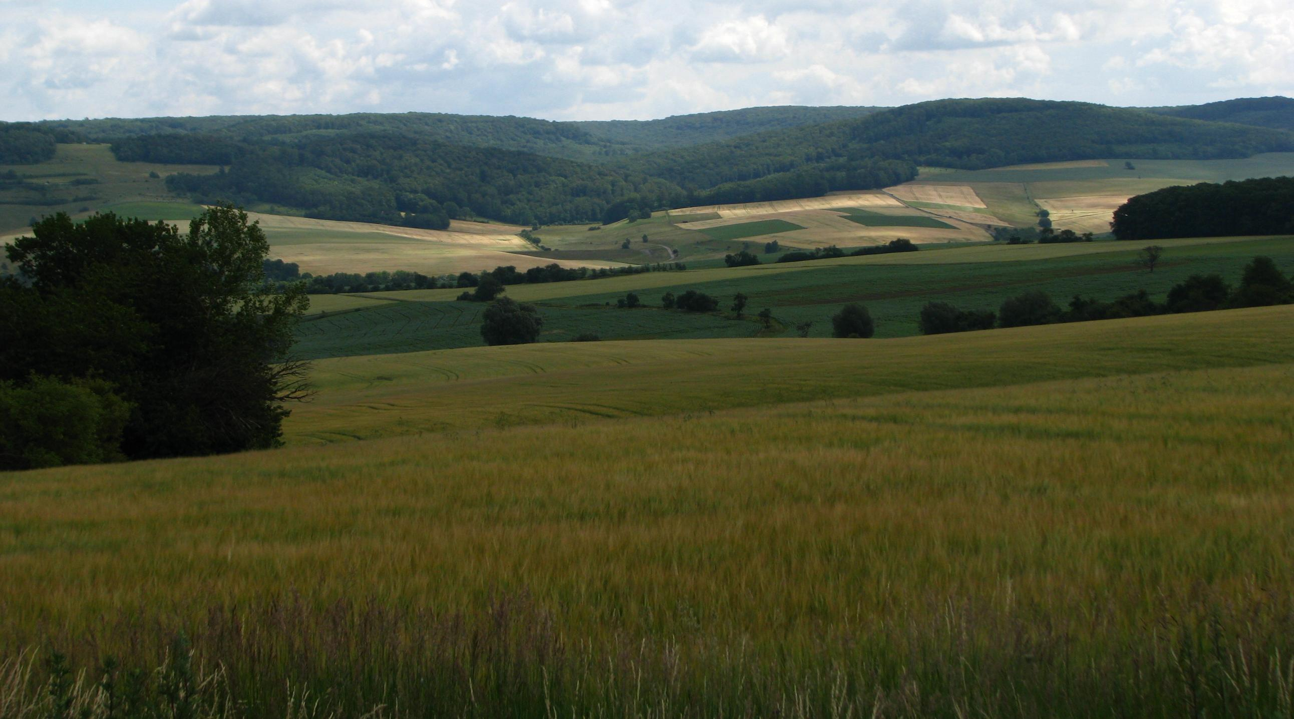 Südwestrand des Hainich vom Reitenberg aus gesehen. Zu sehen sind das Ebertal mit dem Kronenberg (430 m) im Hintergrund, dem Mühlberg (413 m) rechts, dem Eichenberg (420 m) links und dem Harsberg ganz links.